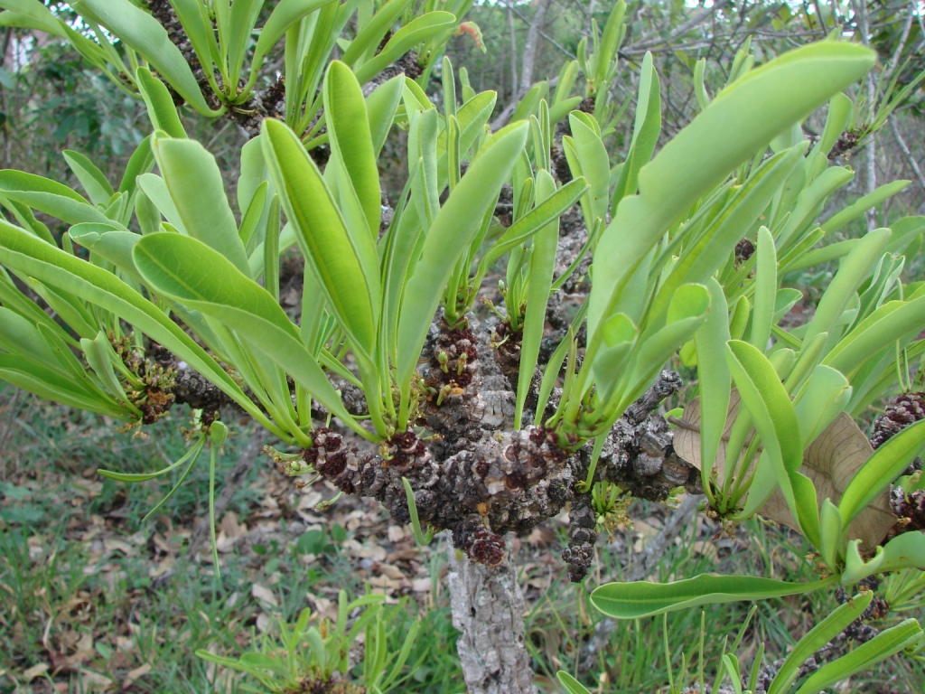 Erythroxylum tortuosum - ERYTHROXYLACEAE Parque Olhos d' água - Brasília - Distrito Federal - Brasil.